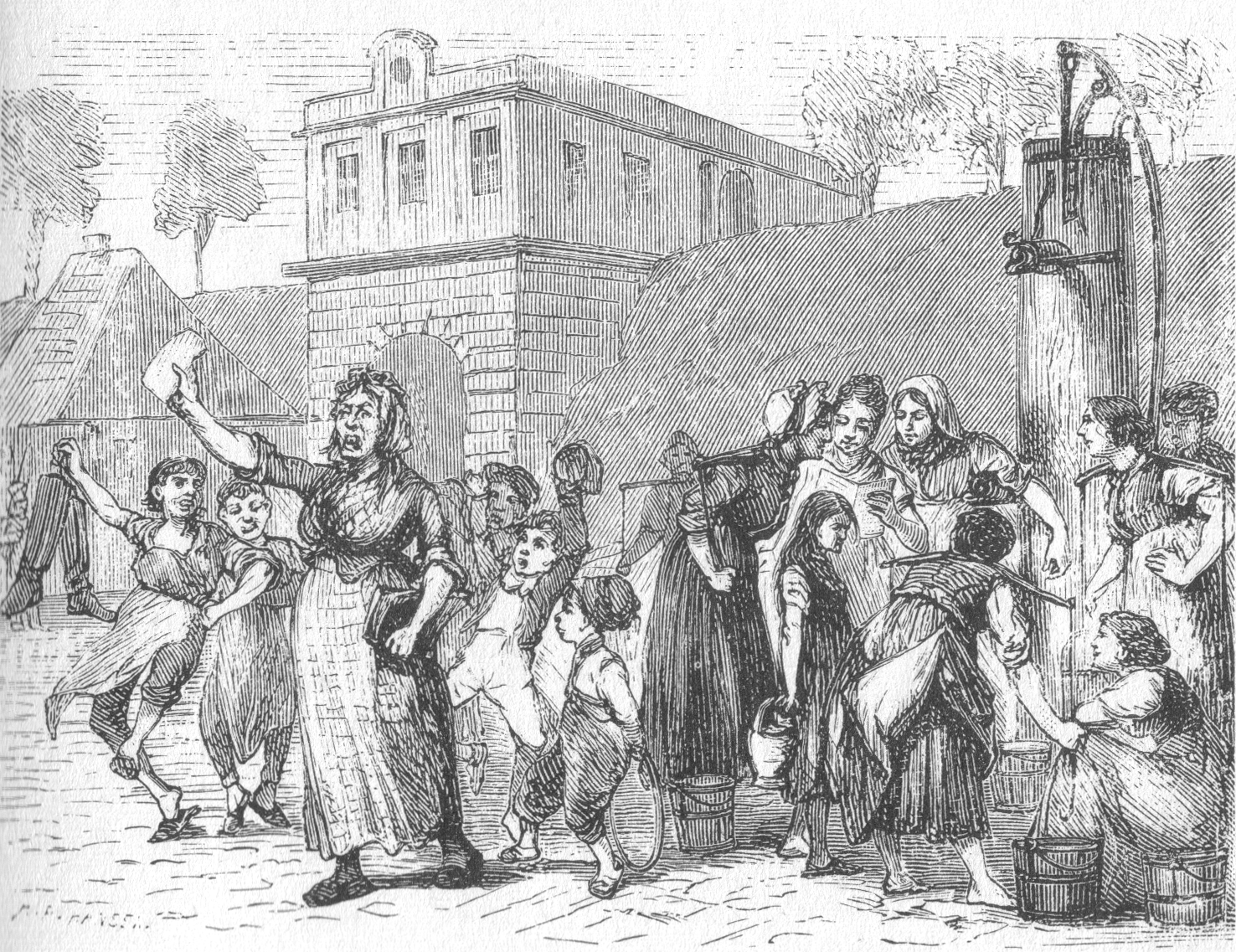 Visekælling